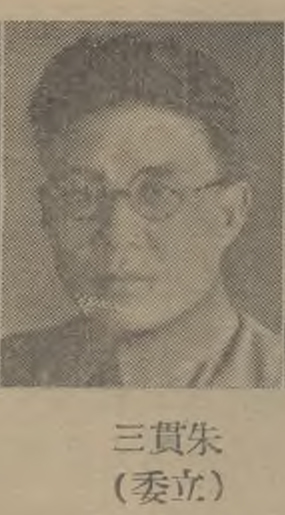 中文（台灣）: 甘肅省立法委員及監察委員